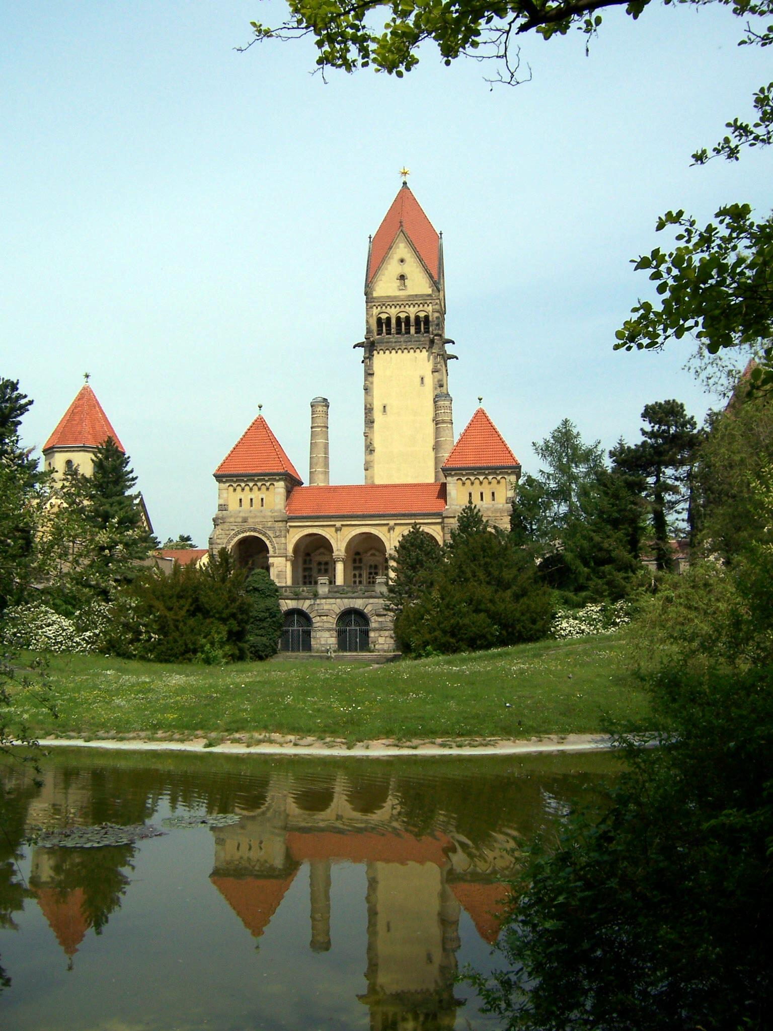 Kapellenanlage des Leipziger Südfriedhofes mit Krematorium und Kolumbarium